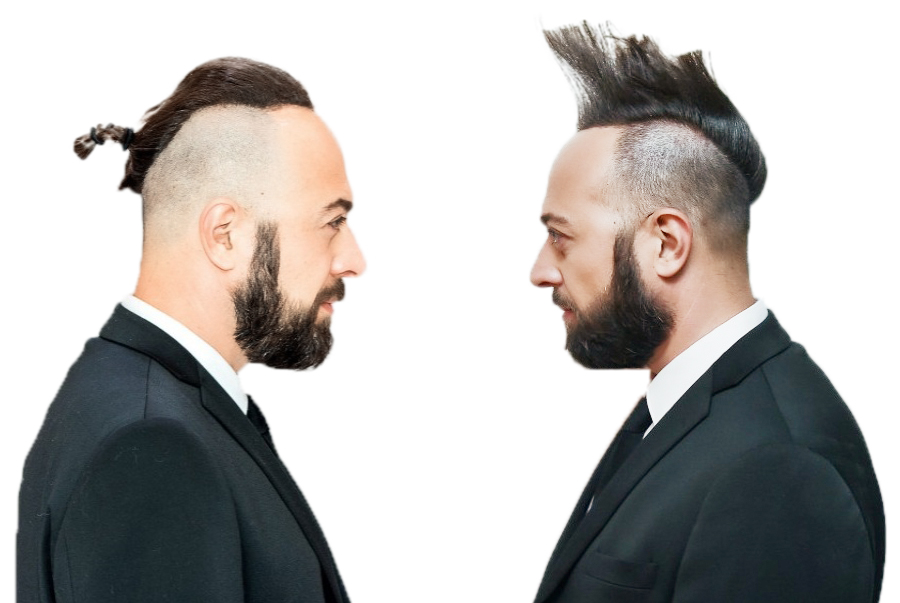 Foto ufficiale per il programma le Iene